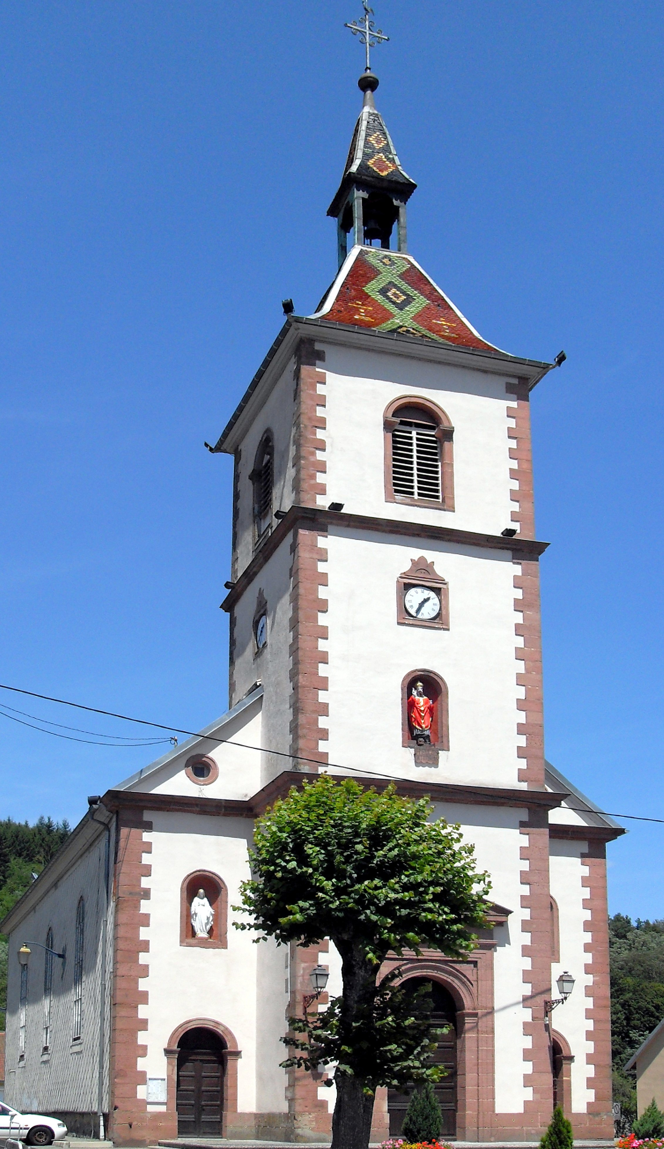 L'église Saint-Éloi à Lauw